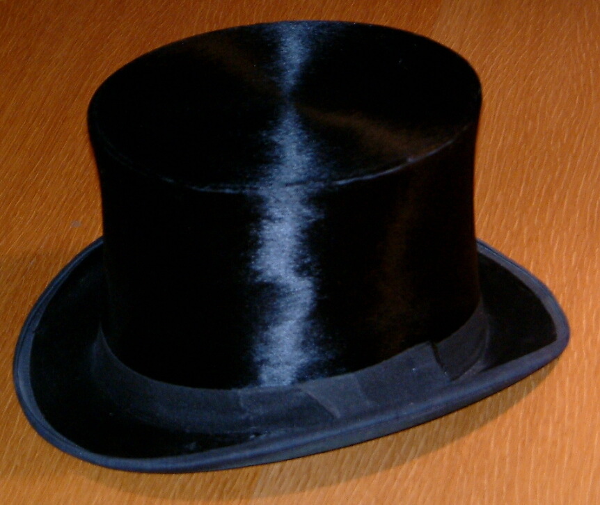 Glanzzylinder (Original text: Klassischer harter Zylinderhut)